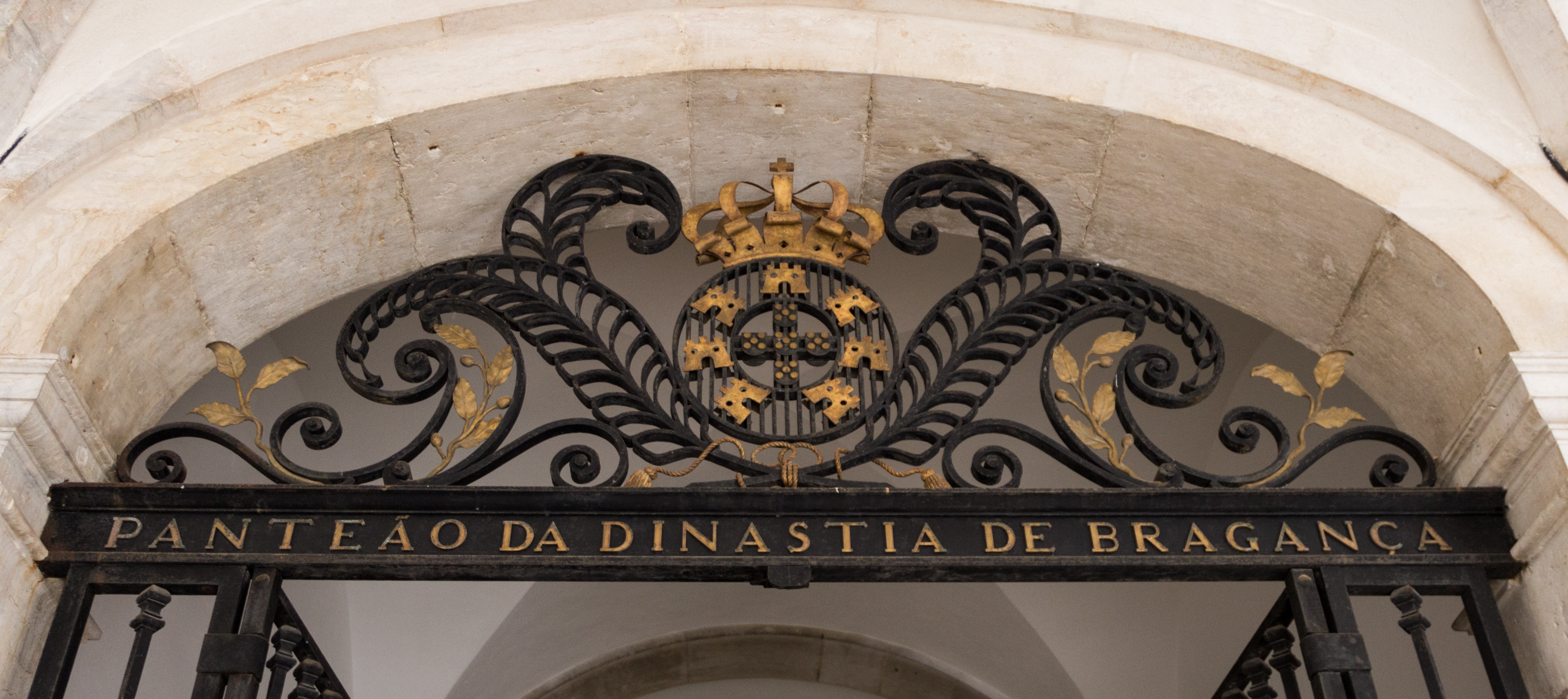 Royal graves